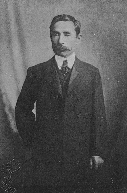 Portrait of Natsume Soseki (夏目漱石, 1867 – 1916)